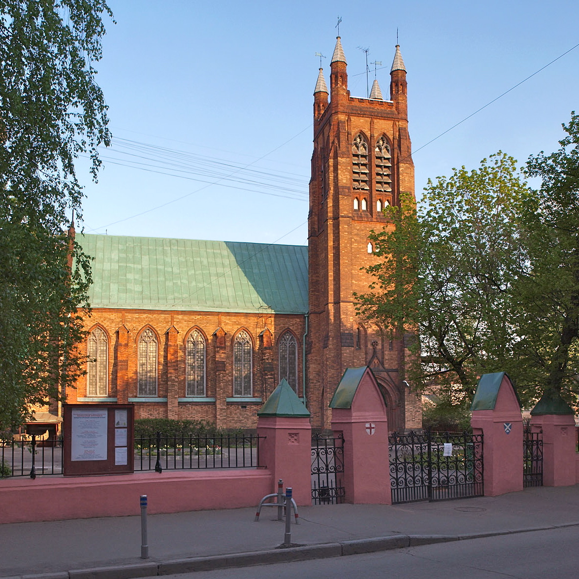 St. Andrew's Anglican Church, Moscow Англиканская церковь Святого Андрея (Москва)